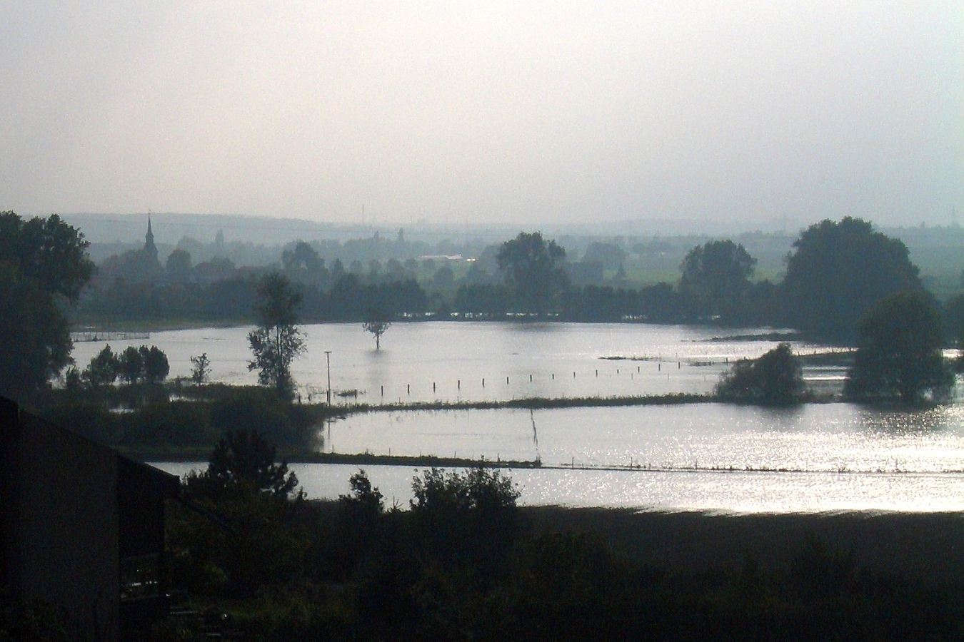 Die Okeraue nördlich von Wolfenbüttel bei Hochwasser, Blickrichtung Süden von der Schwedenschanze.